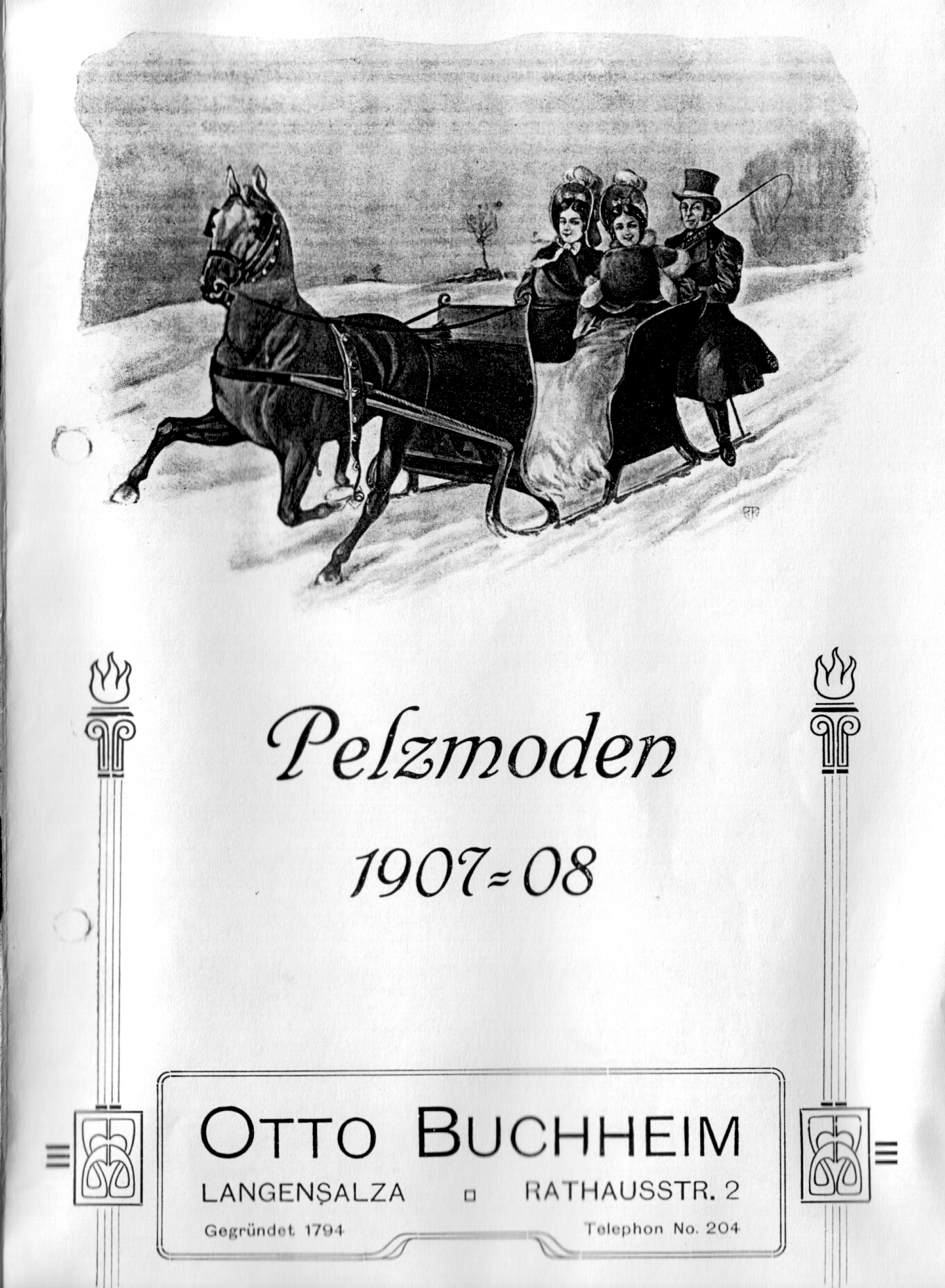 Fur prospectus